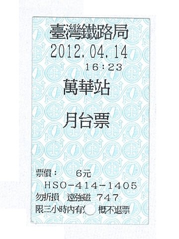 台鐵萬華站月台票